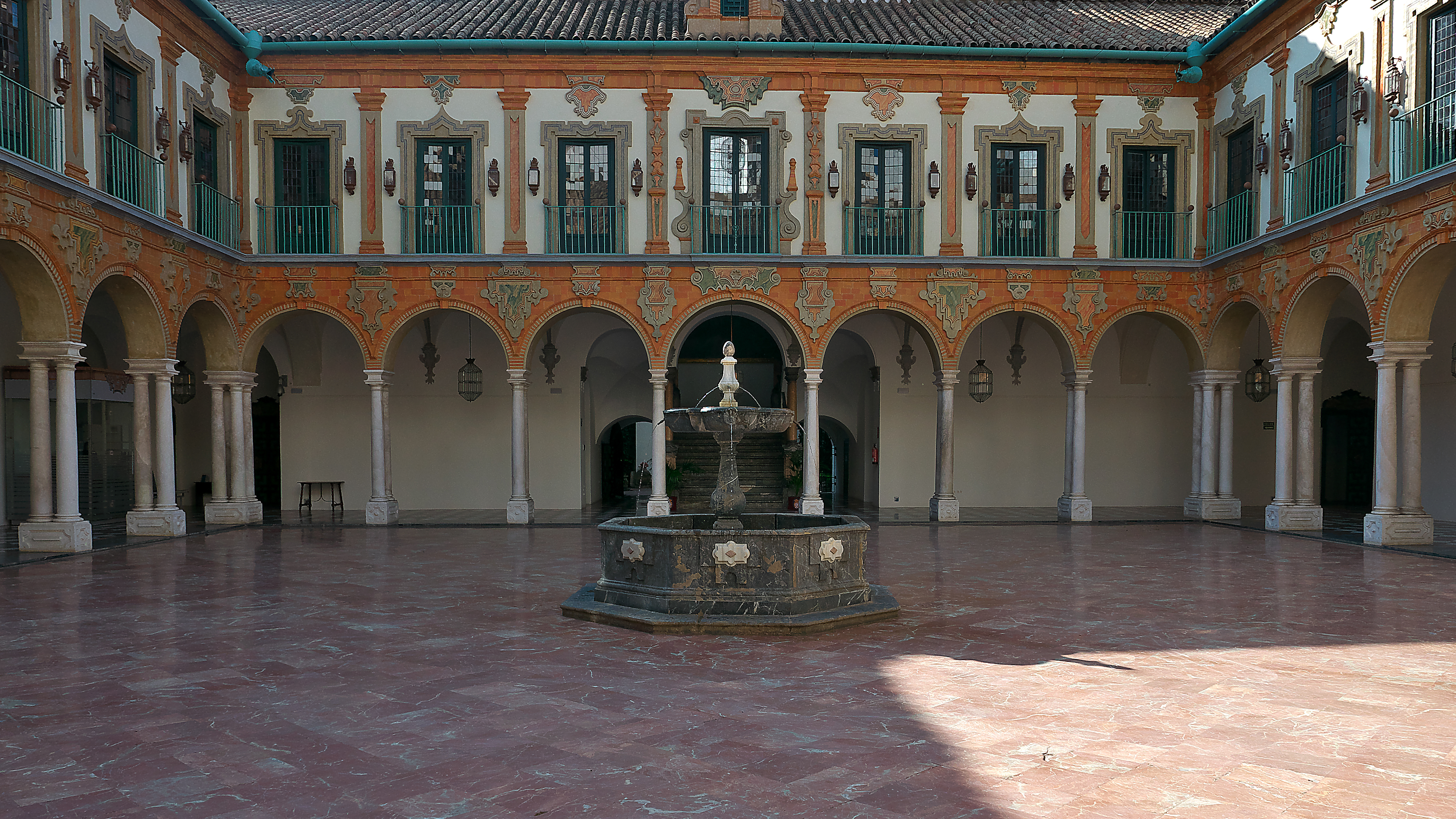 Antiguo claustro del convento mercedario (1752)